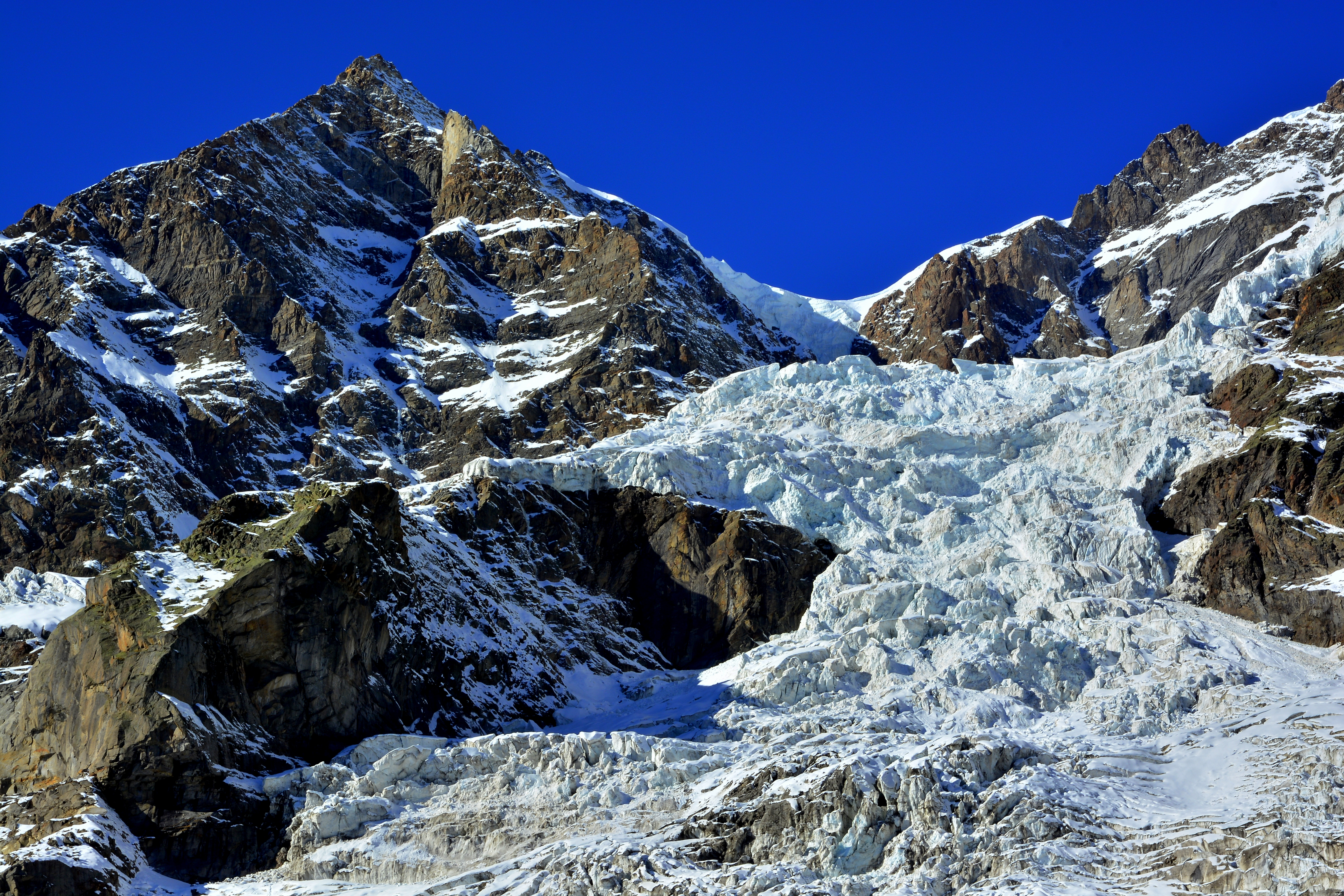 La Punta Giordani m.4046 parete valsesiana del Monte Rosa